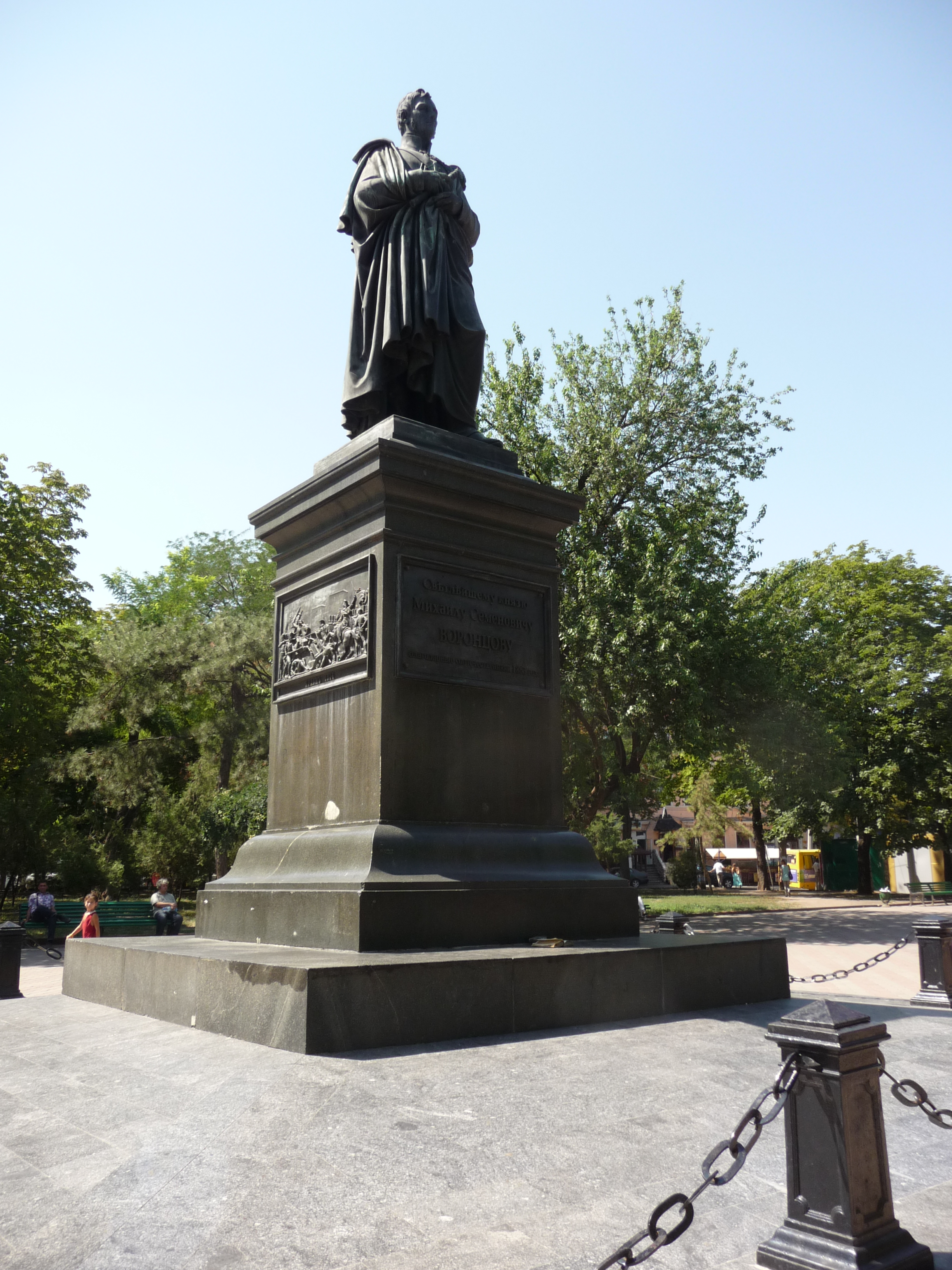 Пам'ятник М.С. Воронцову – князю, генерал-губернатору Новоросійського краю, герою Вітчизняної війни 1812 р., Одеса, Соборна пл.